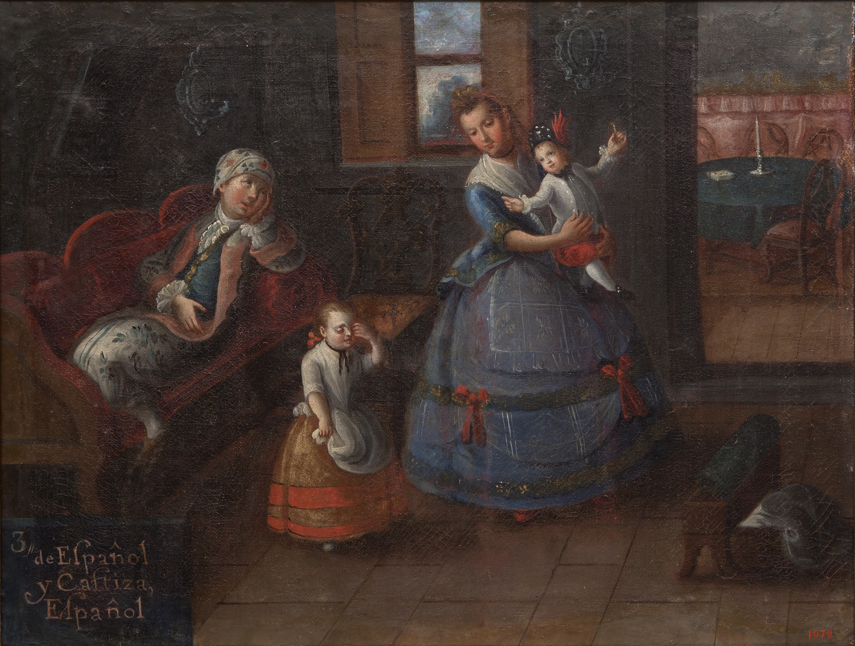 "3 De Español y Castiza, Española". pintura sobre tela. Biblioteca Museu Víctor Balaguer